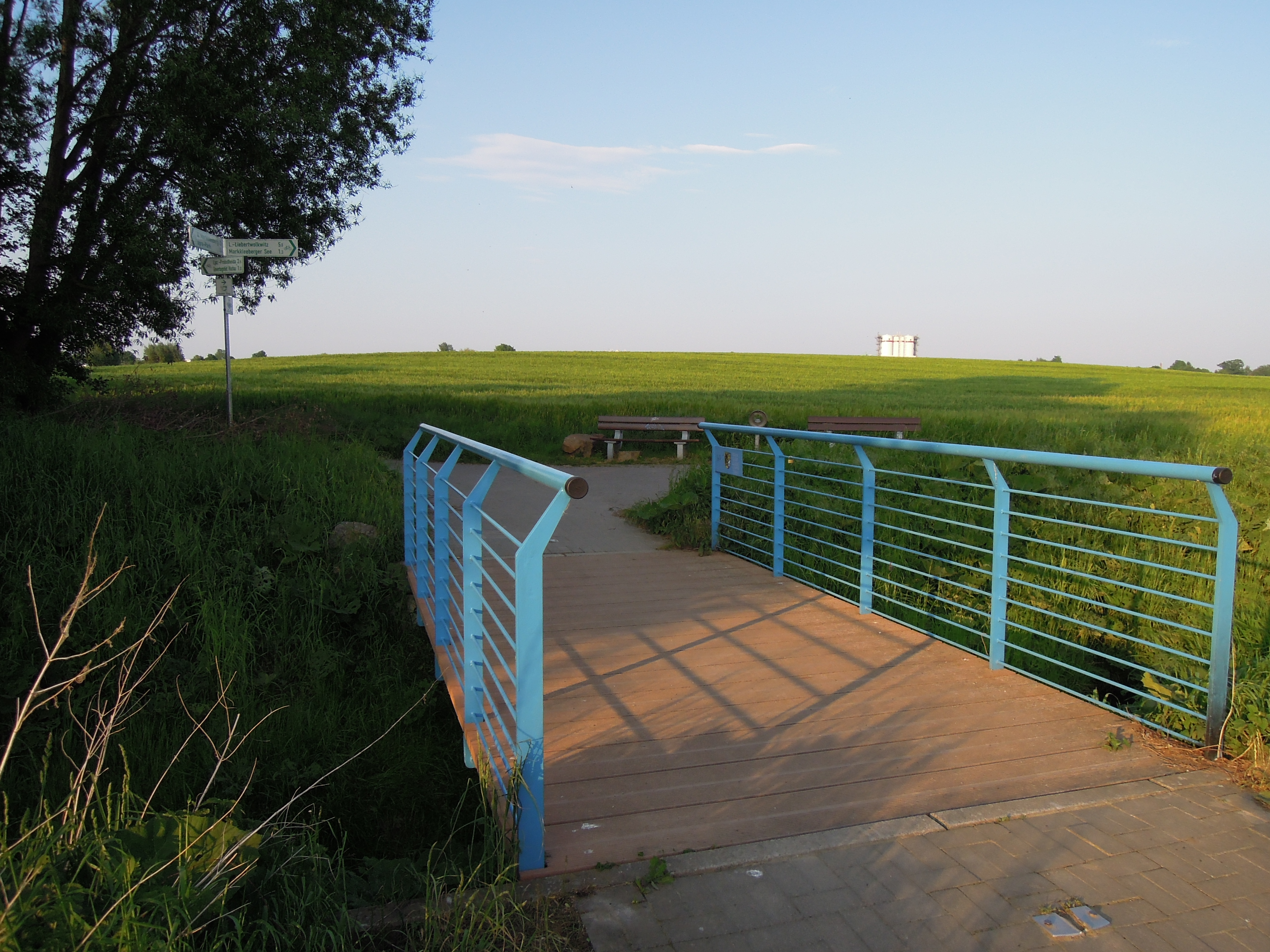 Eine der Geh- und Radwegbrücken über den Graben in der Weinteichsenke in Markkleeberg im Mai 2018; am östlichen Ende des Waldgebiets in der Senke.